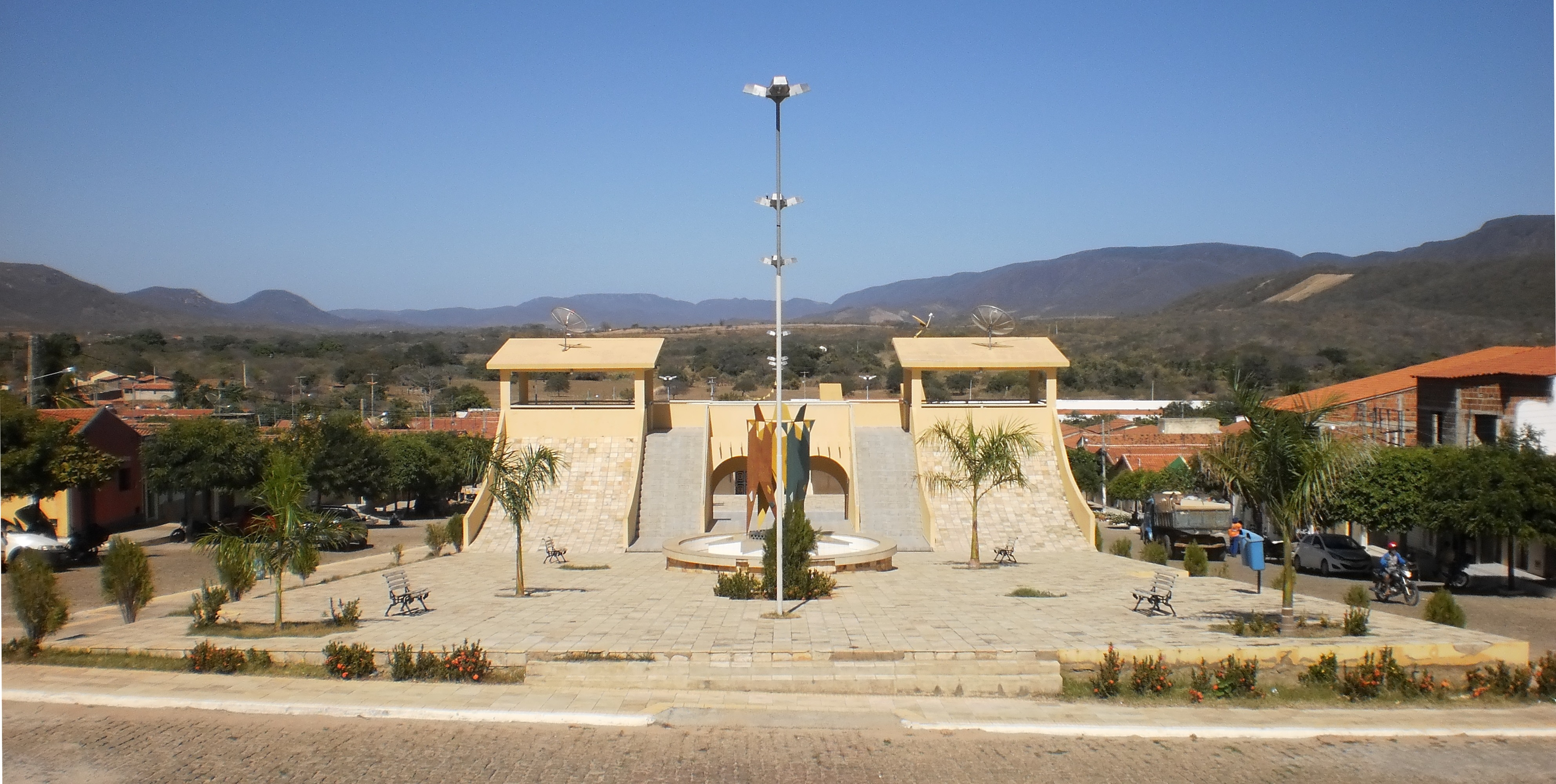 Praça do Povo em Riacho de Santana, Rio Grande do Norte (Brasil)